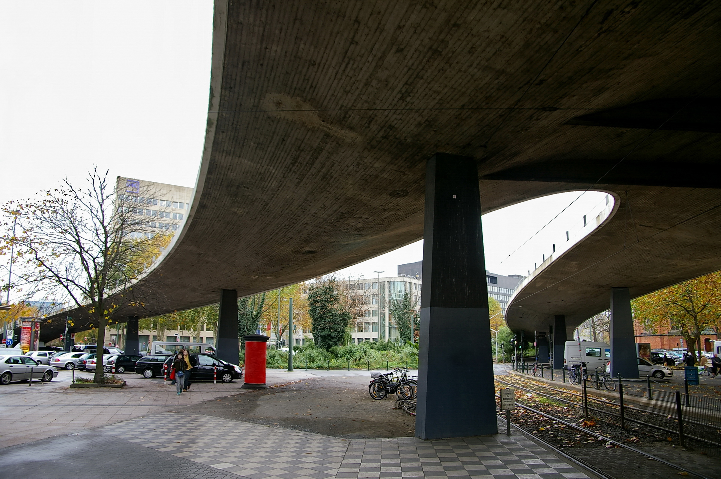 Tausendfüßler in der Düsseldorfer Innenstadt, Abfahrten Richtung Süden von unten.